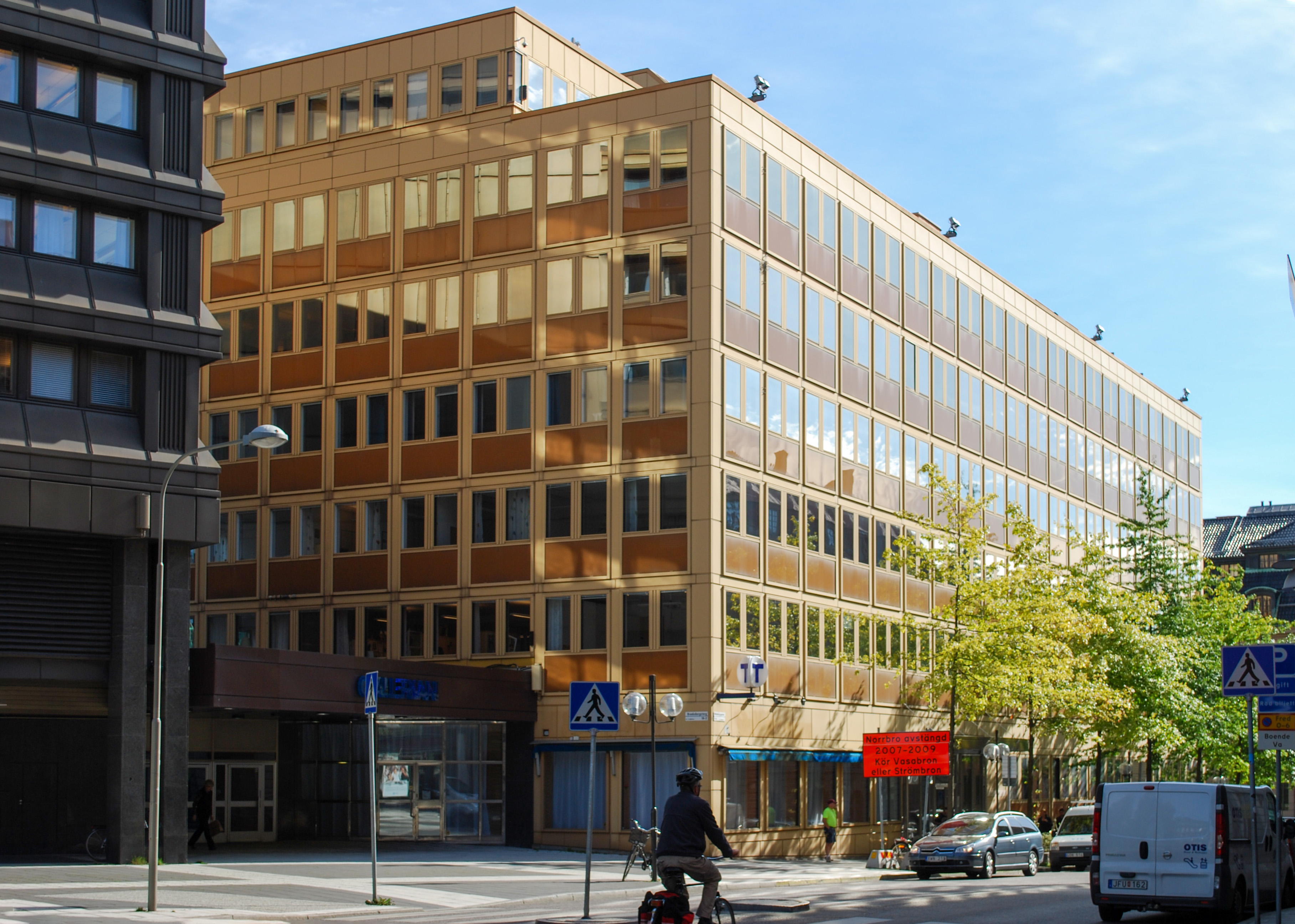 Trollhättan 32, Jakobsgatan / Malmtorgsgatan. Arkitekter Boijsen & Efvergren. Byggnadsår 1975 - 1982